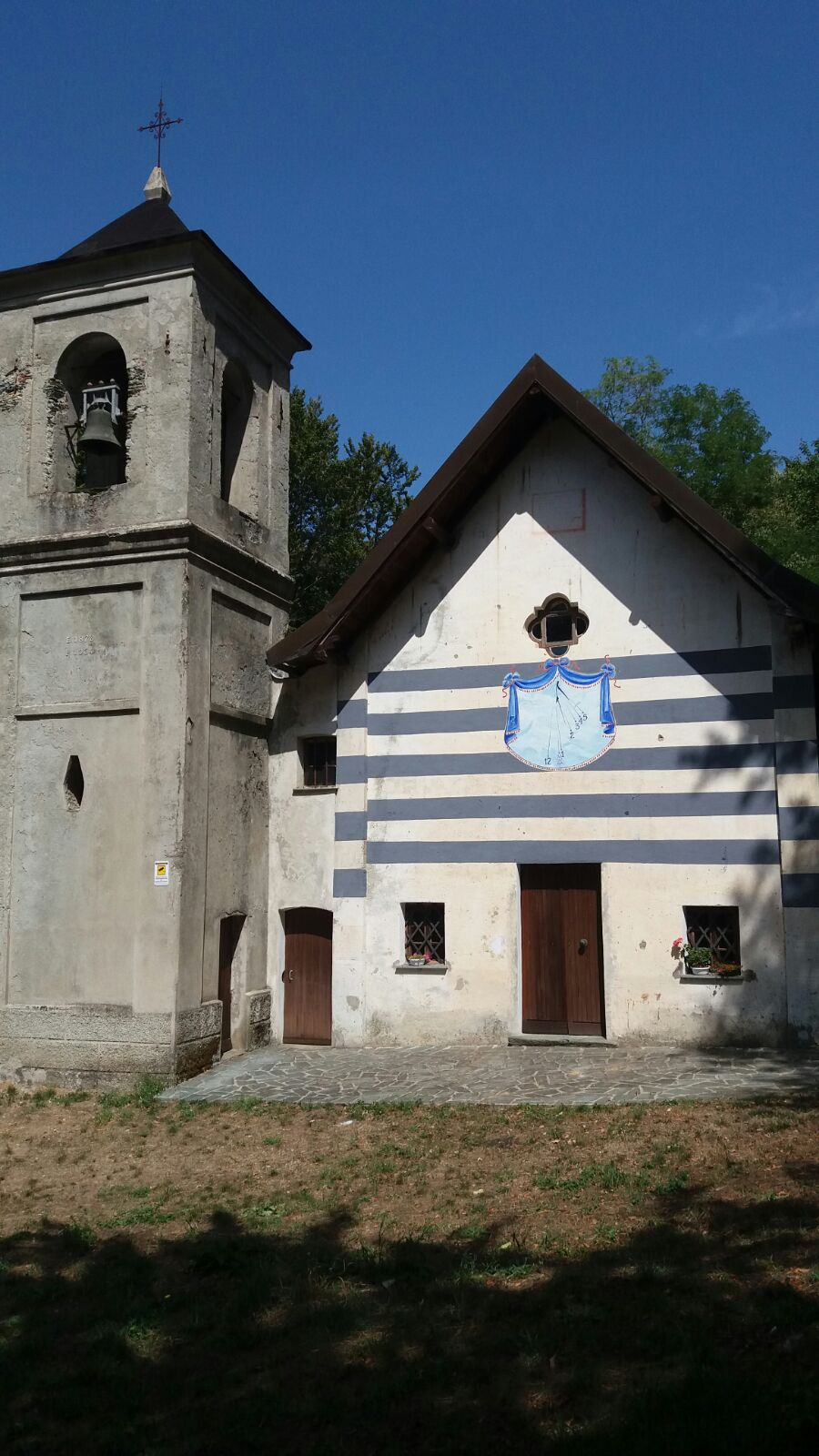 Cappella Madonna della Guardia in Località Dano a Piampaludo (Sassello) dopo la ristrutturazione della facciata